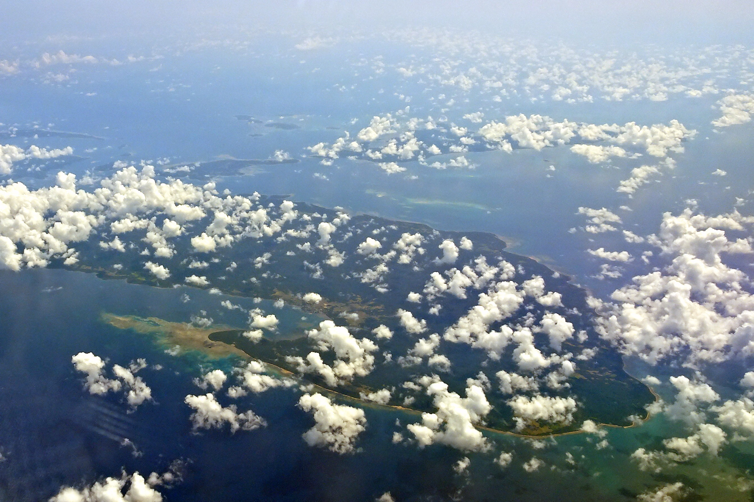 Polillo Island, Quezon Province, Philippines